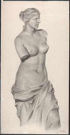 Werk uit de academieperiode.